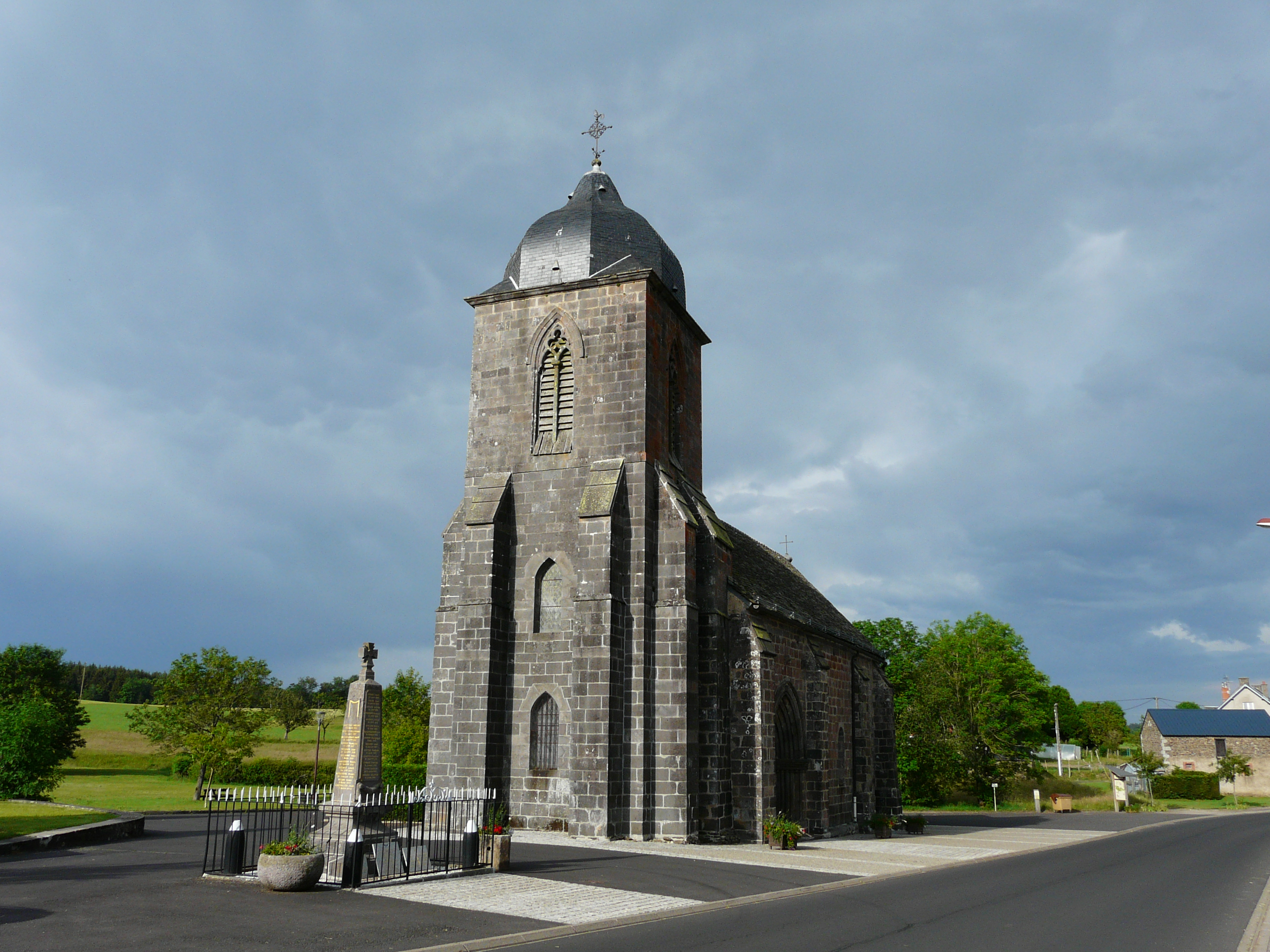 L'église Sainte-Madeleine de Briffons, Puy-de-Dôme, France.